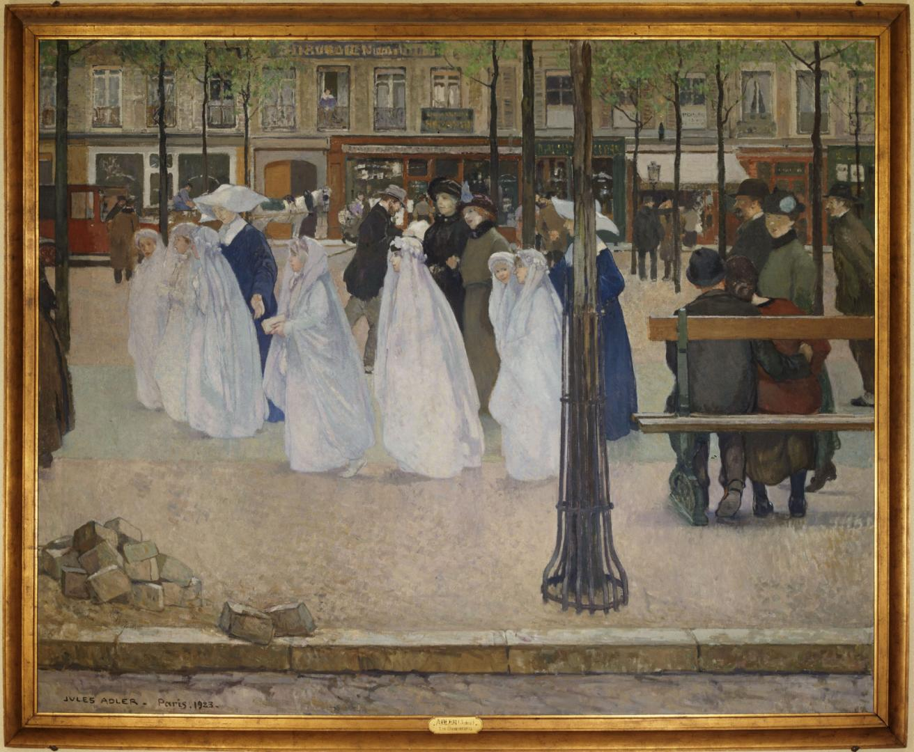 ADLER Jules,1923 - Printemps de Paris, Les Communiantes (Carnavalet) - See Details pictures (Détails – Particulari – Detalles)